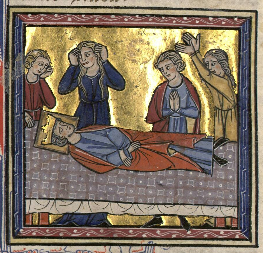 Death of Amalric I